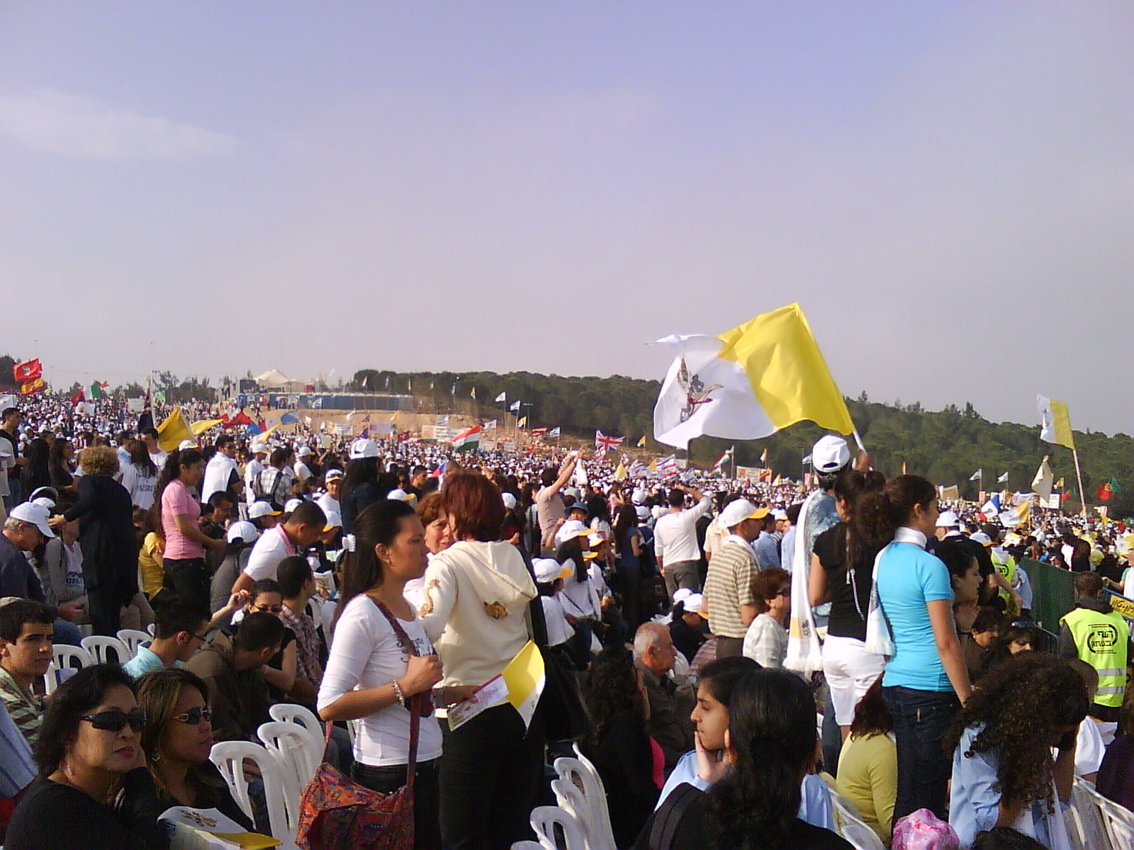 המיסה המרכזית של האפיפיור בנצרת בהר הקפיצה